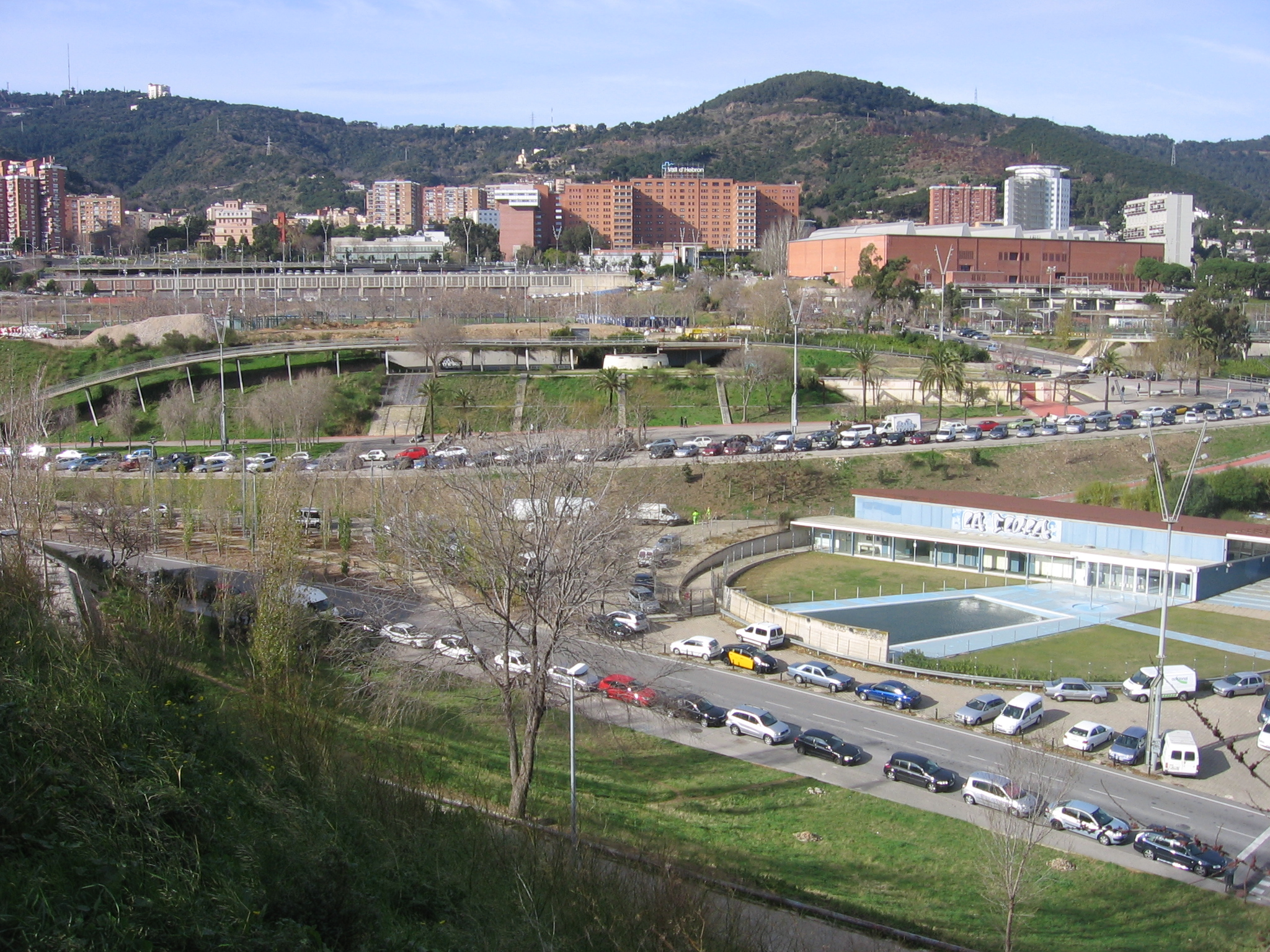 Parque del Valle de Hebrón.